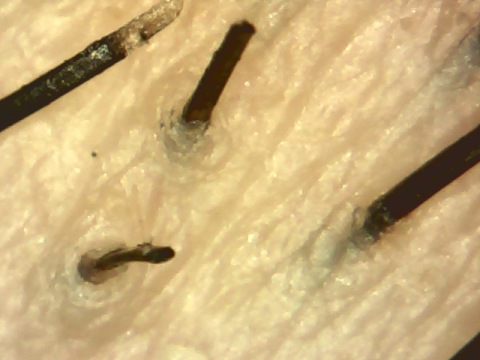 Particolare di peli di barba